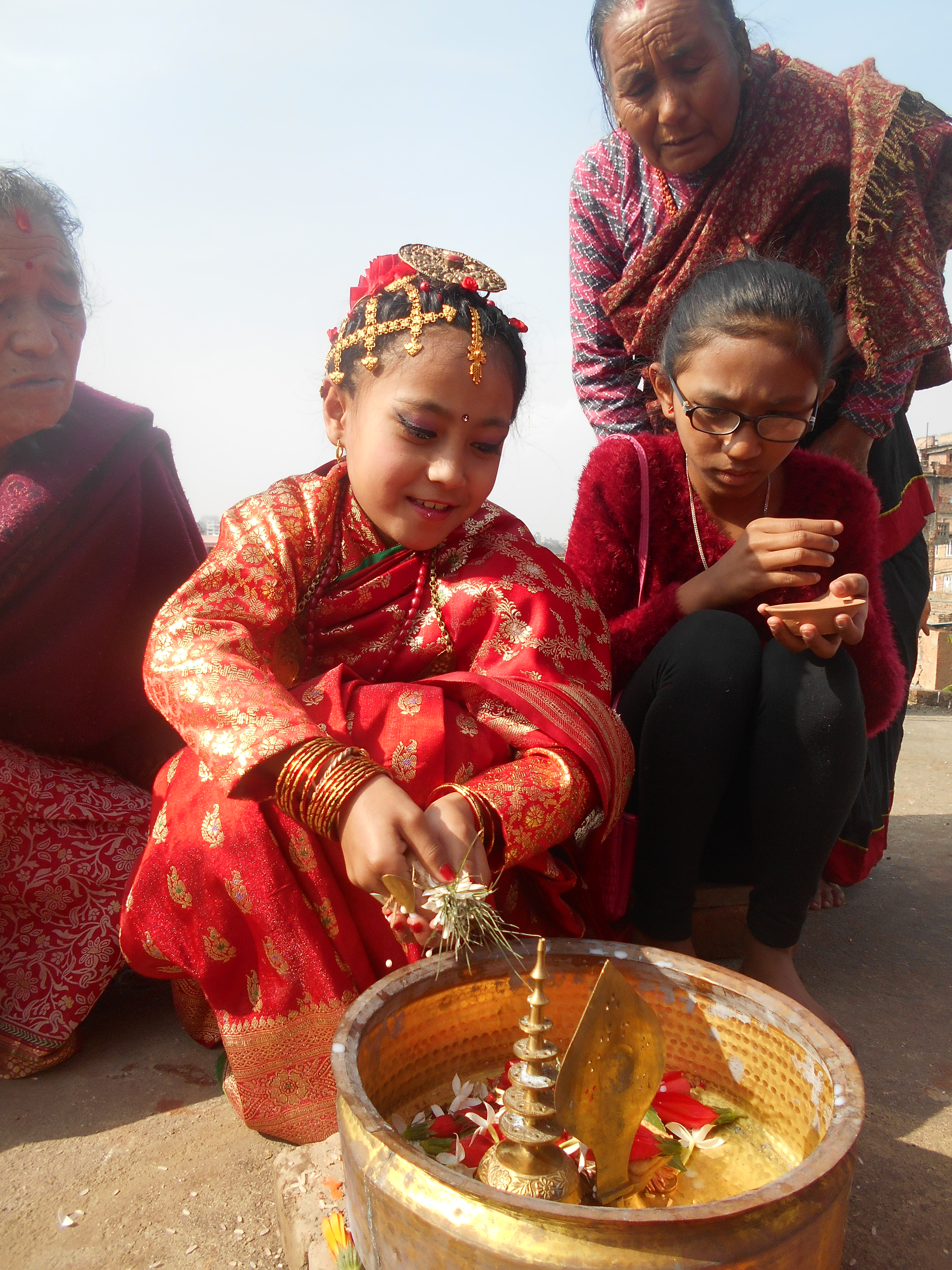 नेपाली: सुर्यदर्शन (गुफा राख्ने)